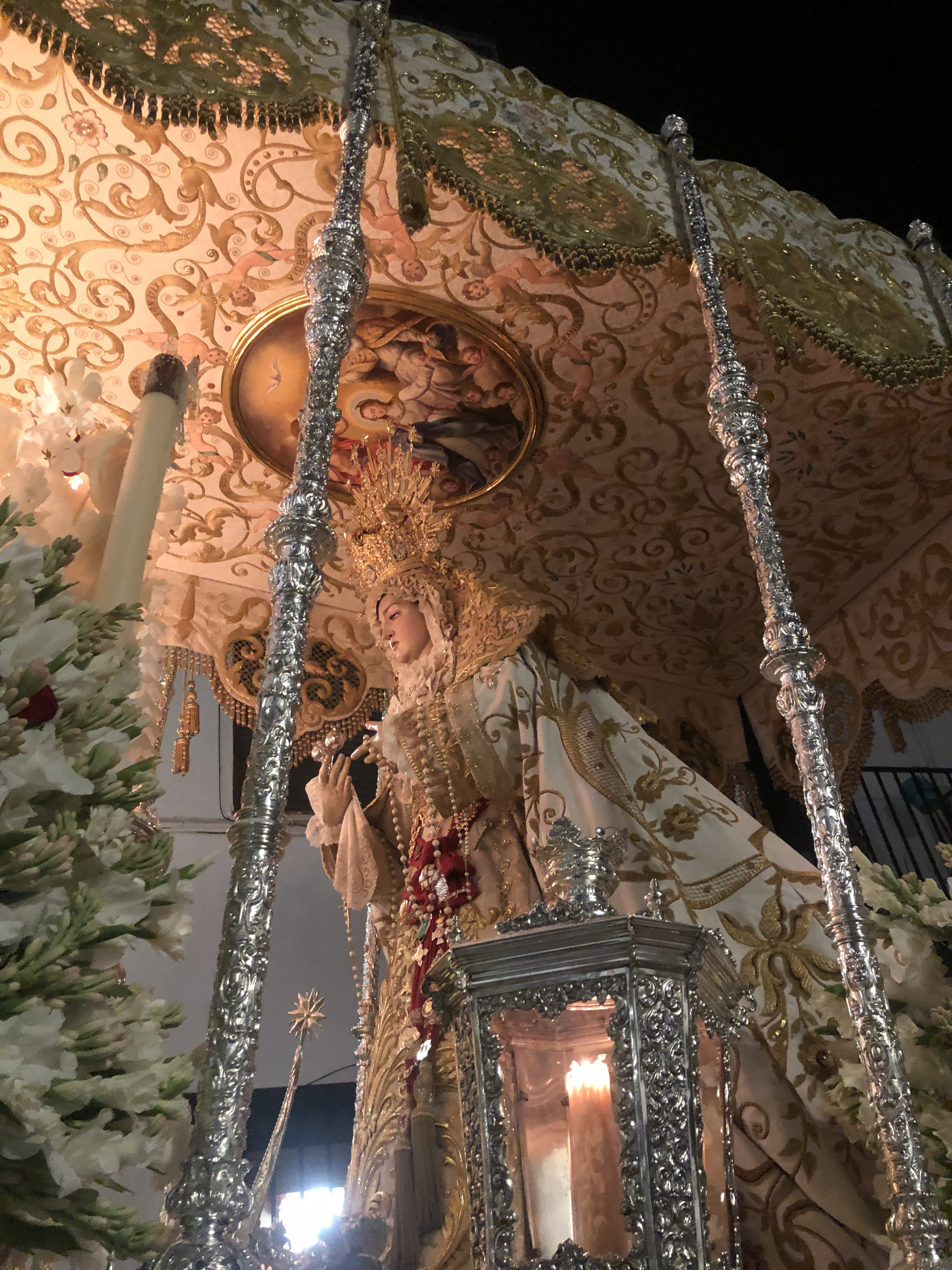 Virgen Aurora Granada